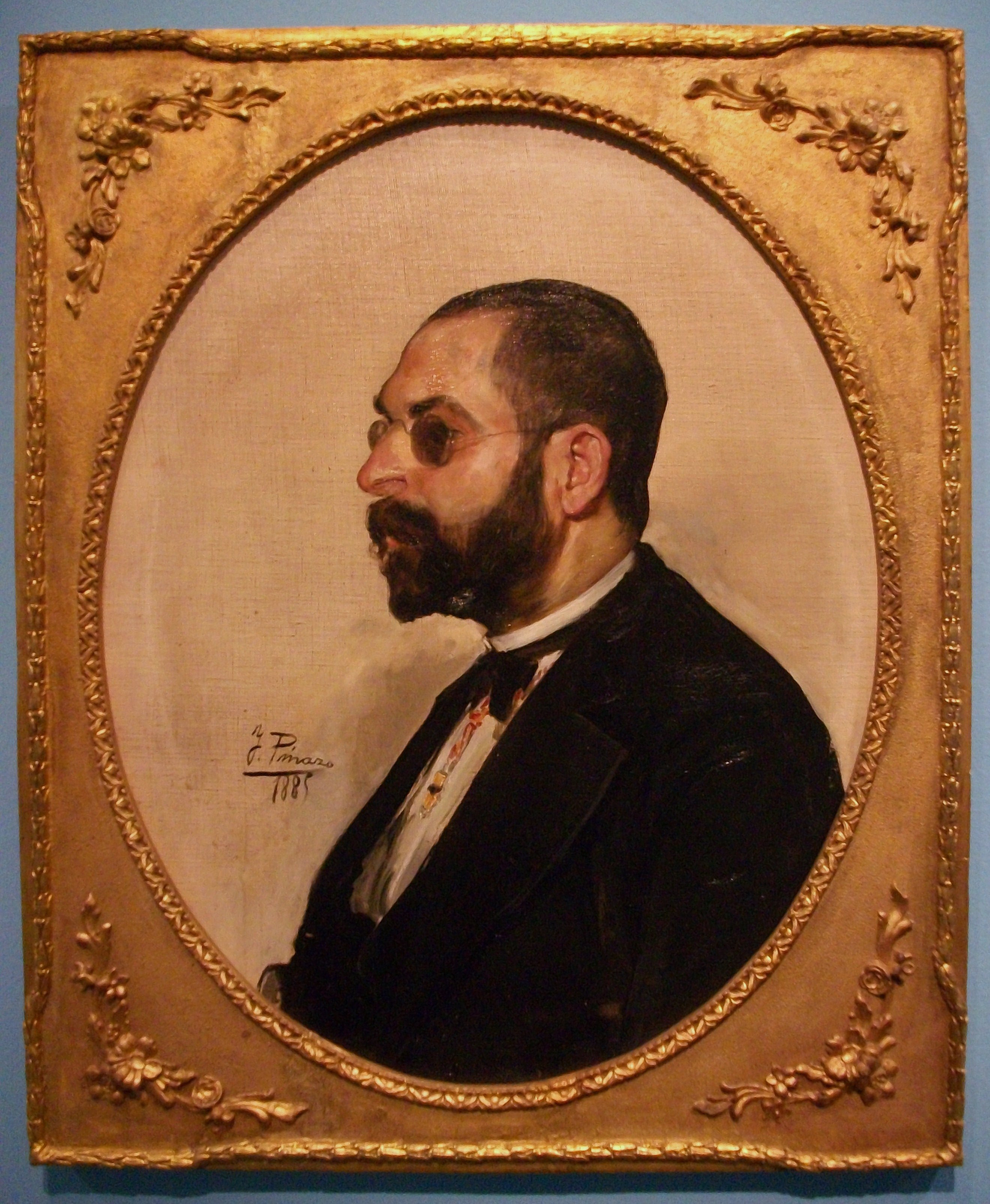 Retrat de Constantí Llombart